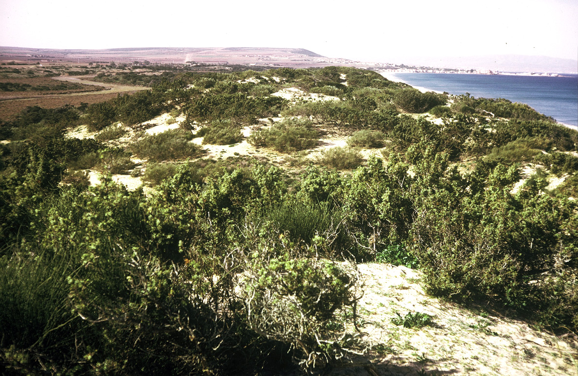 Cordon dunaire de La Macta en 1975. A droite, la Méditerranée; à gauche, l'oued et la végétation palustre longeant les dunes.Sur les dunes, la végétation se dégrade ... et en particulier les Genéviers oxycèdres. Dans le lointain : Marsat El Hadjaj.